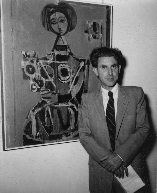 יעקב וכסלר בפתיחת תערוכת יחיד במוזיאון תל אביב, 1954